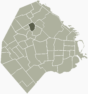 Barrio de Villa Ortúzar